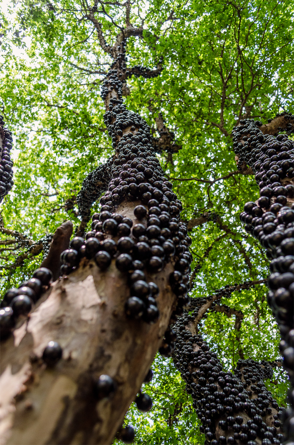 Fruta Jabuticaba Plinia cauliflora (syn. Myrciaria cauliflora), em Nova Odessa - SP, Brasil.